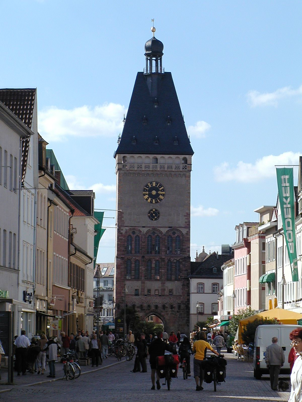 Das Altpörtel in Speyer